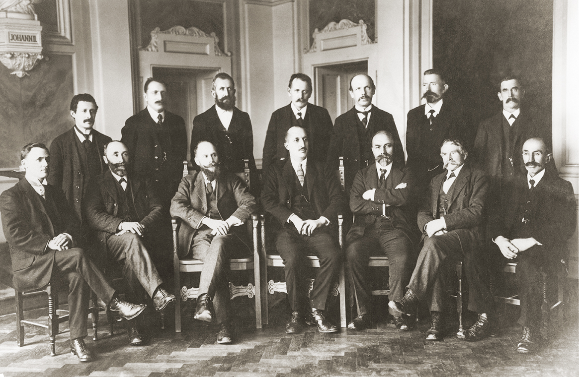 Der Liechtensteiner Landtag von 1921 mit Regierungschef. Vordere Reihe von links: Eugen Nipp, Josef Marxer, Regierungschef Josef Ospelt, Landtagspräsident Fritz Walser, Emil Risch, Albert Wolfinger, Franz Josef Hoop. Hintere Reihe von links: Johann Wohlwend, Johann Wanger, Josef Gassner, Karl Kaiser, Peter Büchel, Josef Sprenger, Johann Hasler. Auf dem Bild fehlen Wilhelm Beck und Gustav Schädler.